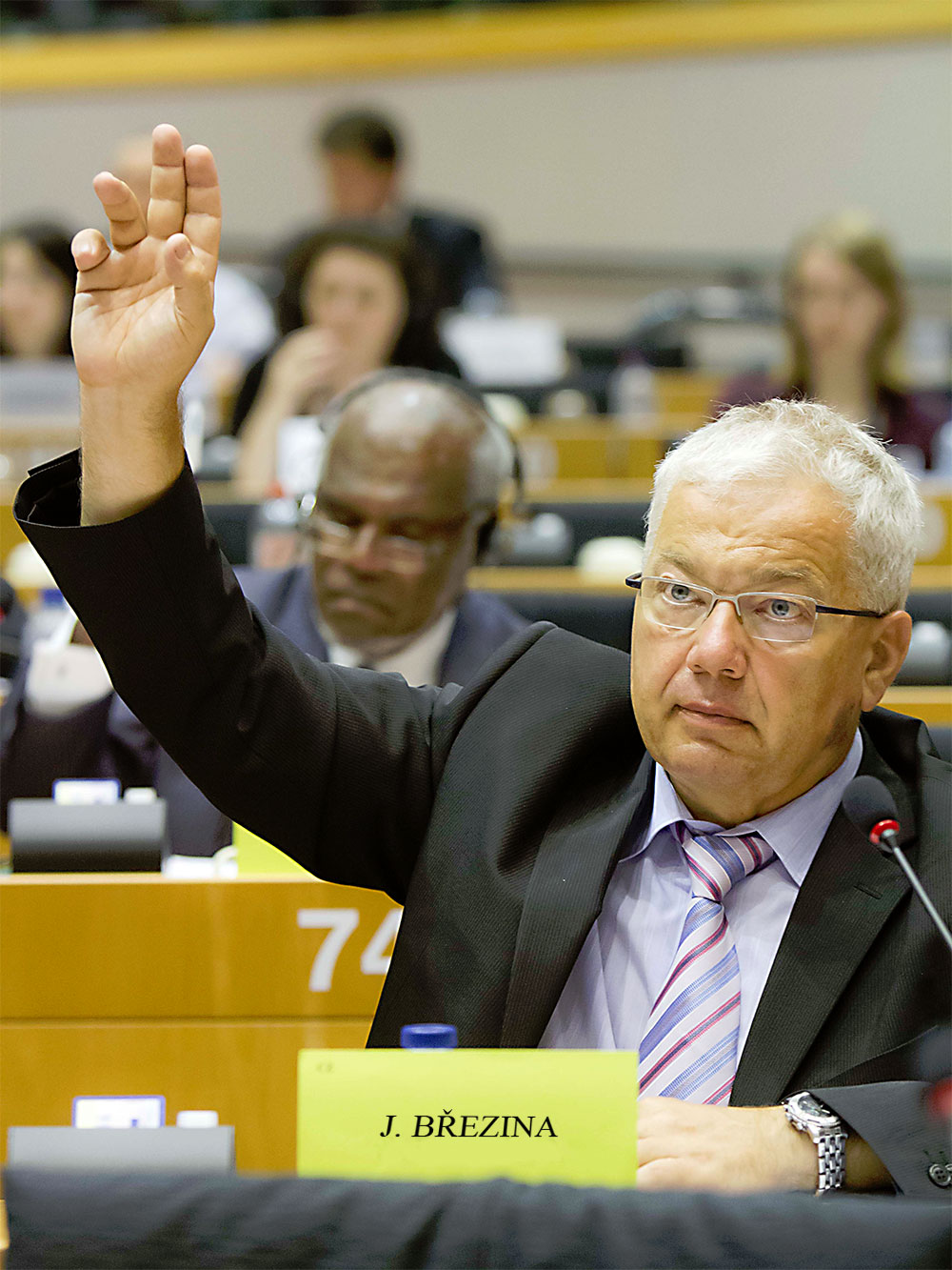 hlasování